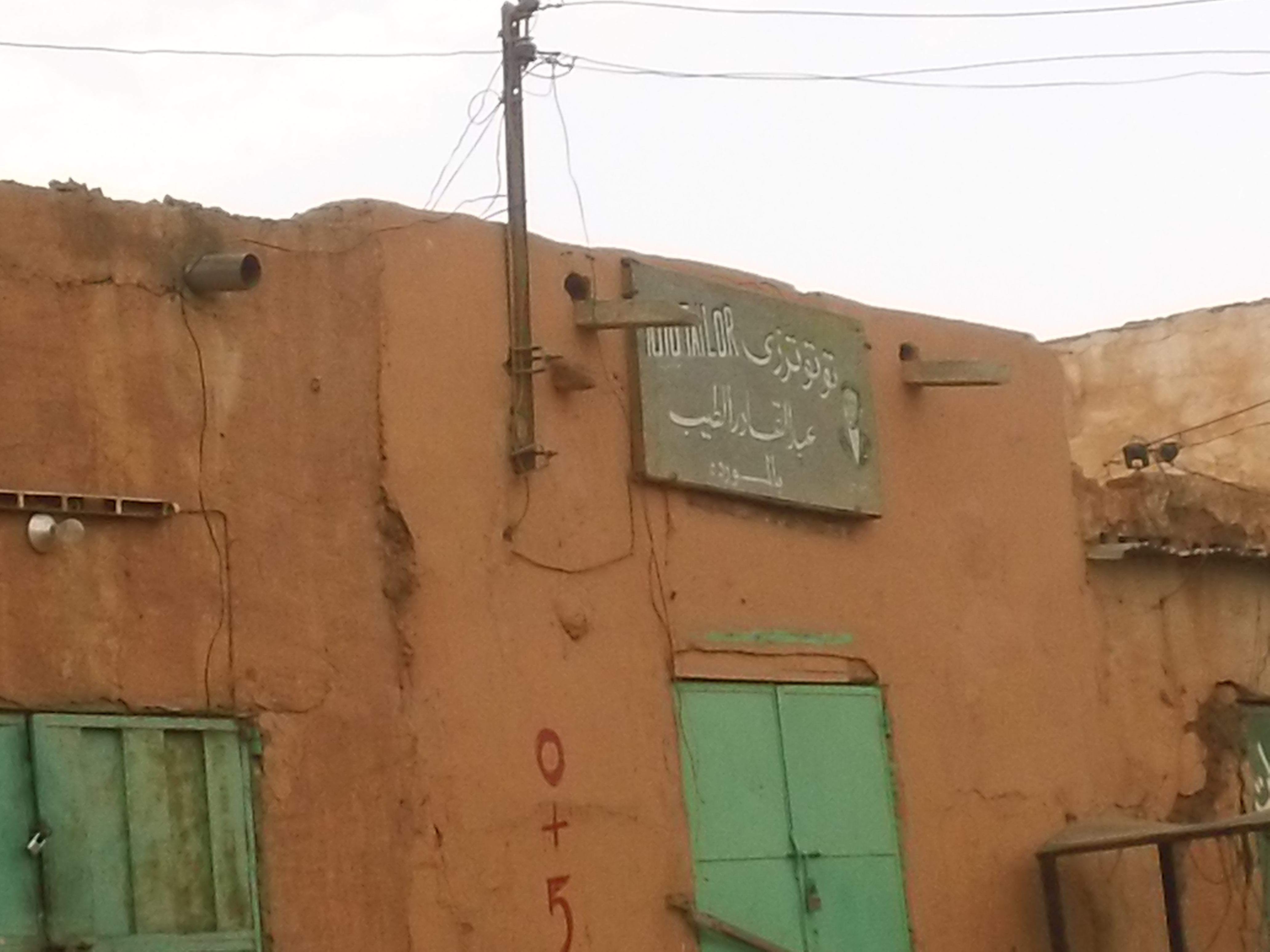 Almorada market - Omdurman - Sudan